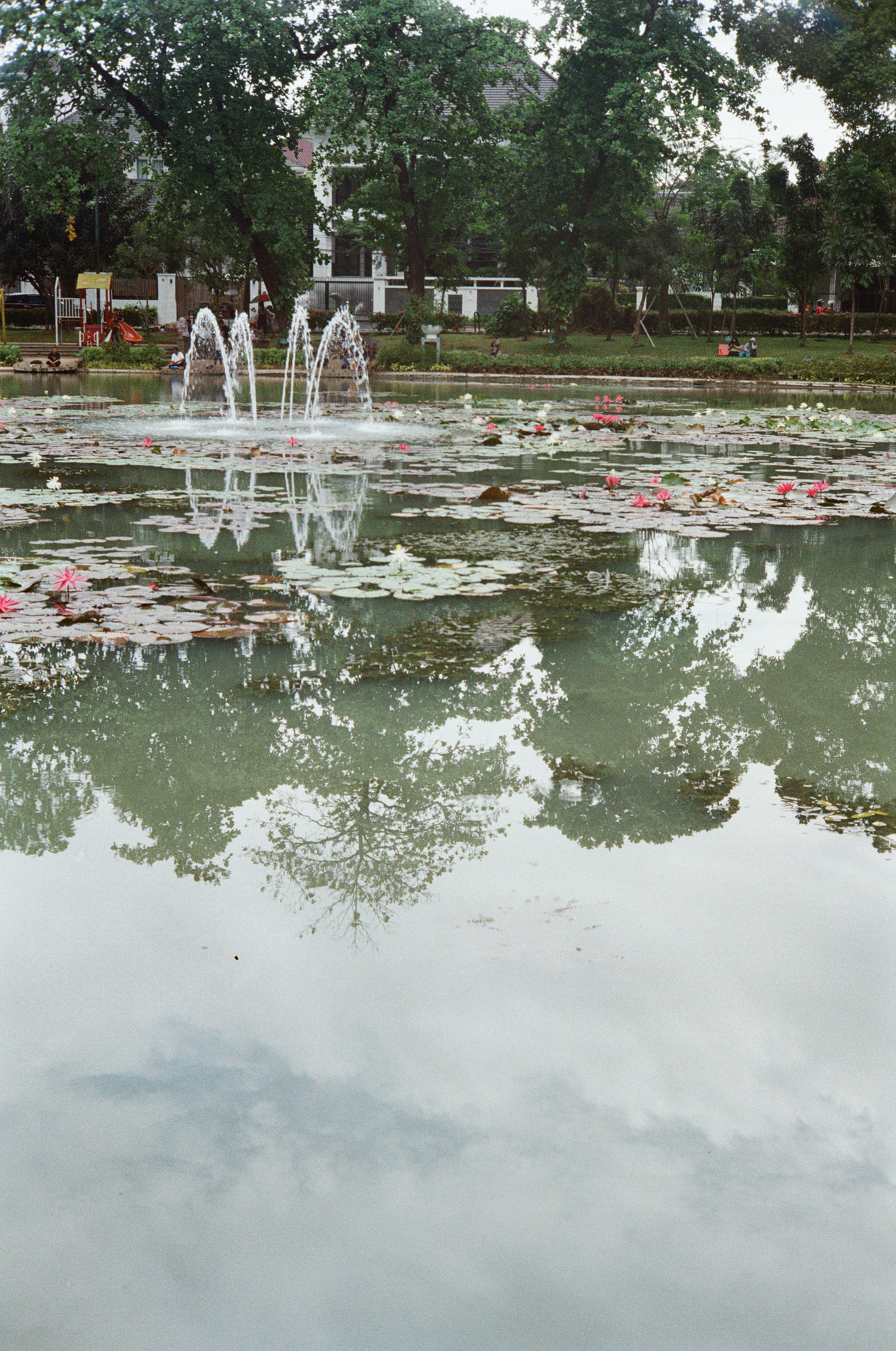 Air mancur ditengah-tengah situ/kolam